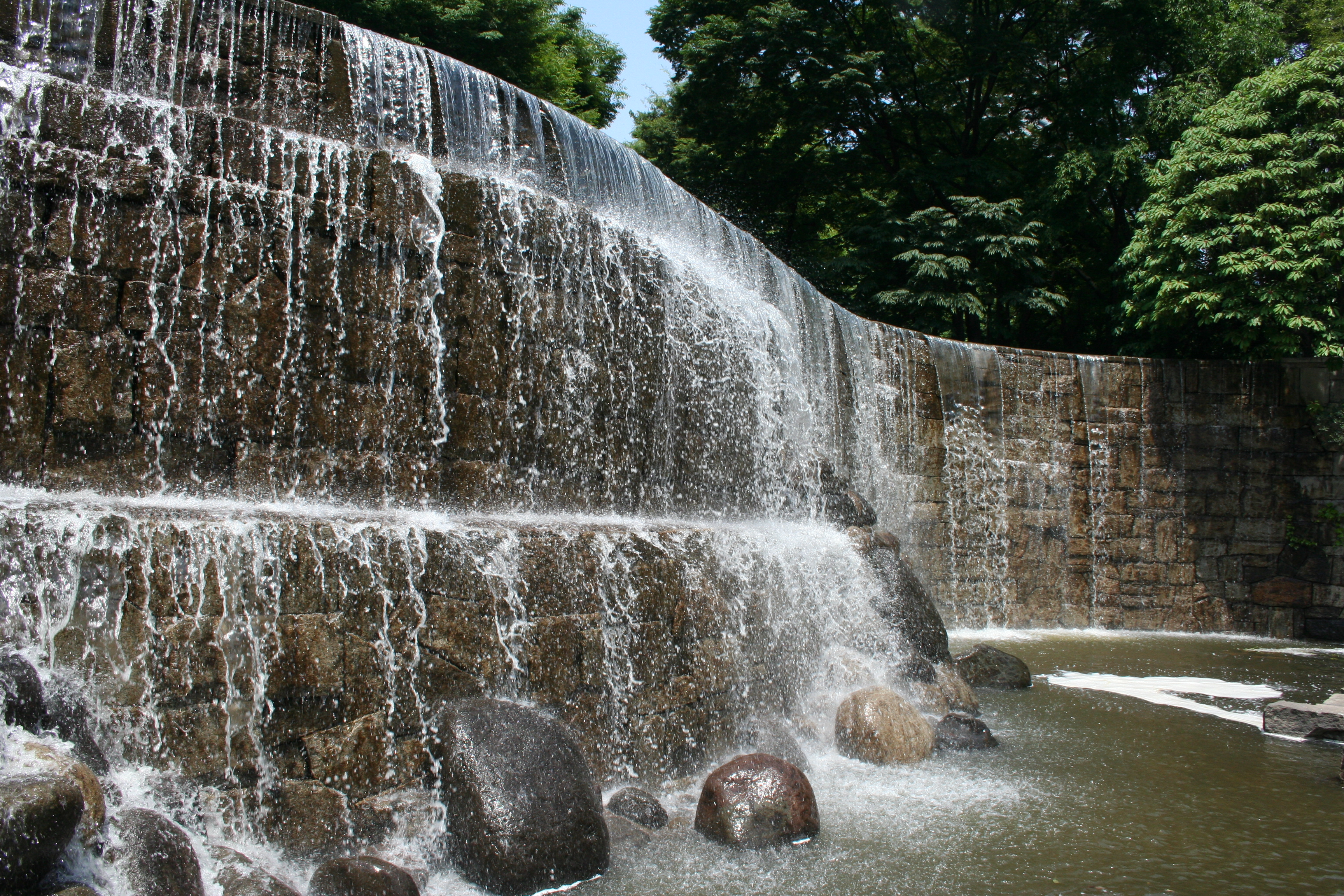 新宿中央公園の「新宿ナイアガラの滝」（東京・新宿区西新宿2-11）